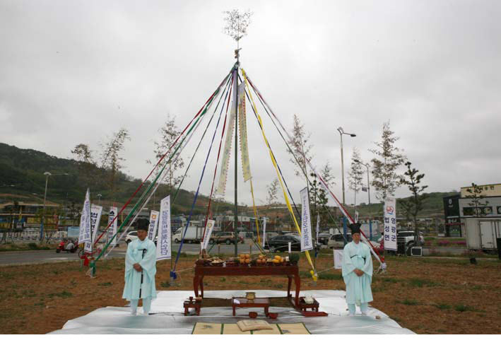 '법성포 단오제'는 전라남도 영광군 법성포 이대에서 단오 무렵 지역 주민에 의해 전승되어 온 전통적인 민속축제이다. 법성포에는 조선시대 한양으로 올라가는 세곡을 관리하는 조창(漕倉)이 있었으며, 조기 파시(波市)의 중심지였기에 오래전부터 상권(商圈)이 발달한 지역이었다. 이러한 사회·경제적인 배경을 바탕으로 파시가 형성되는 시기에 난장(亂場)이 크게 섰으며, 이 지역에서 자연스럽게 단오제가 발생하는 계기가 되었다.